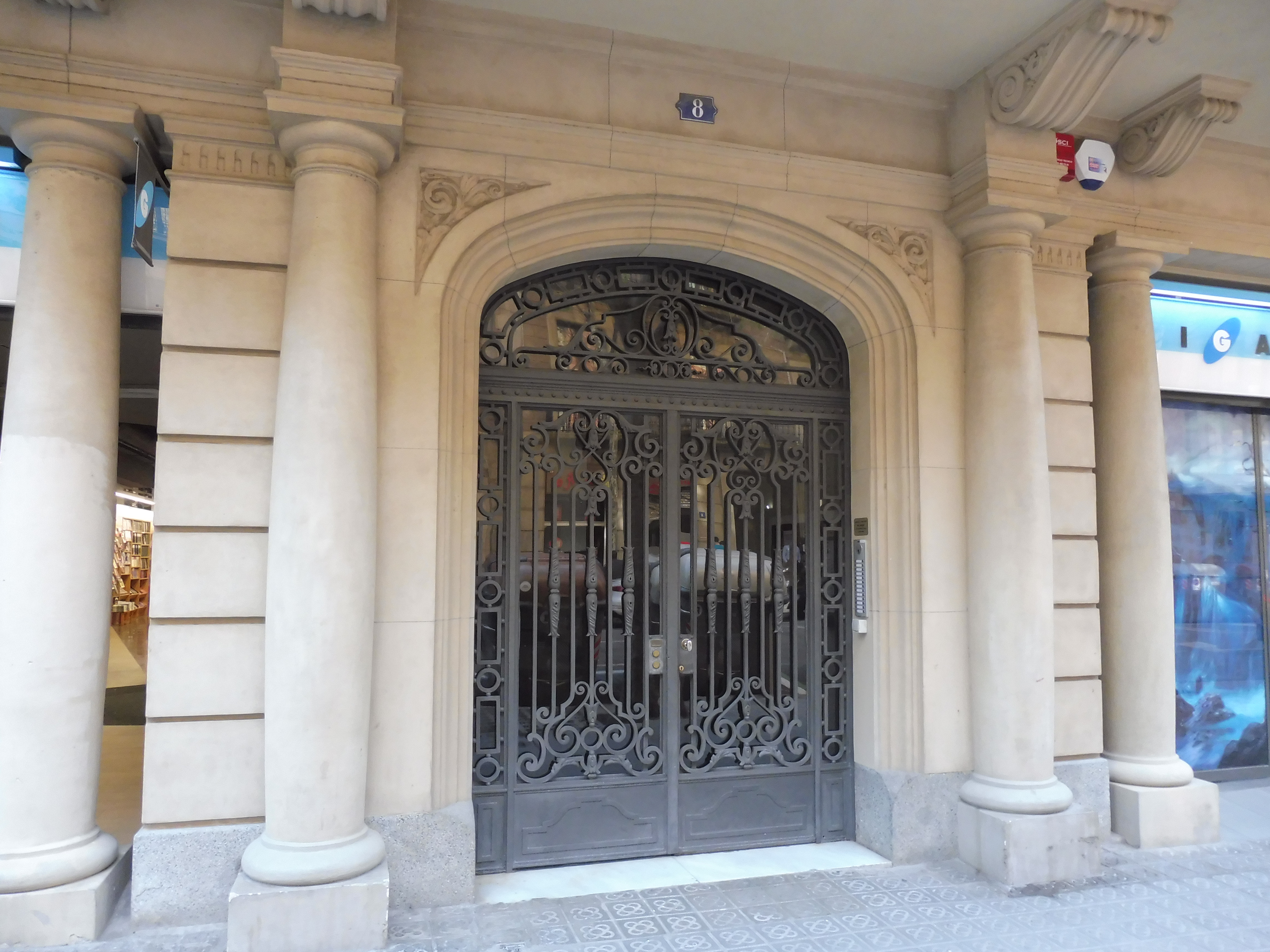 1935-Bailèn 8. Balarí (nebots de Vicens), fàbrica de folres i panes. Claret Masats (Pau), metge. Sans Balmes (Ramon), propietari, 2º 1ª. Suñé Fornells (Miquel), metge, pral. 2ª. 1948-Bailèn 8. Claret Masats (Pau), metge, principal 1ª. Manufacturas Textiles Torra-Balarí Sdad. Anónima. fàbrica de folreria. Suñé Fornells (Miquel), metge, principal 2ª. Torra-Balarí Llavallol (Joan), enginyer industrial yèxtil, baixos. 1961-Bailèn 8. Claret Masats (Pau), metge, principal 1ª. Manufacturas Textiles Torra-Balarí Sdad. Anónima, fàbrica de folreria. Pardiña Pascual (Joaquim), metge. Pardiña Suñé (Jordi), metge. Suñé Schreiber (Francesc), metge. Suñé Fornells (Miquel), metge, principal 2ª. Torra-Balarí Llavallol (Joan), enginyer industgrial tèxtil, baixos. 2017-Bailèn 8. Gigamesh, vici i subcultura.